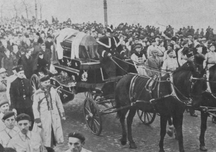 Trumna z ciałem Romana Dmowskiego w kondukcie żałobnym podczas jego pogrzebu. Warszawa 1939 r.